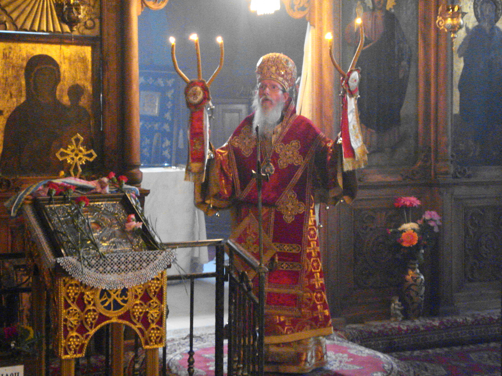 Негово Високопреосвещенство Сливенски митрополит Йоаникий благославя вярващите по време на светата литургия по случай празника свето Успение Богородично в едноименния храм в Несебър